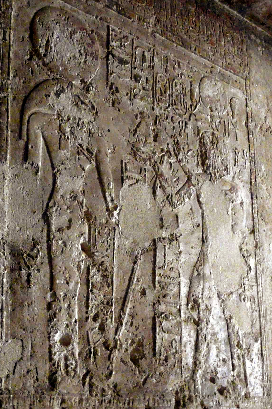 Hatshepsut et Pakhet. Intérieur du Spéos Artemidos